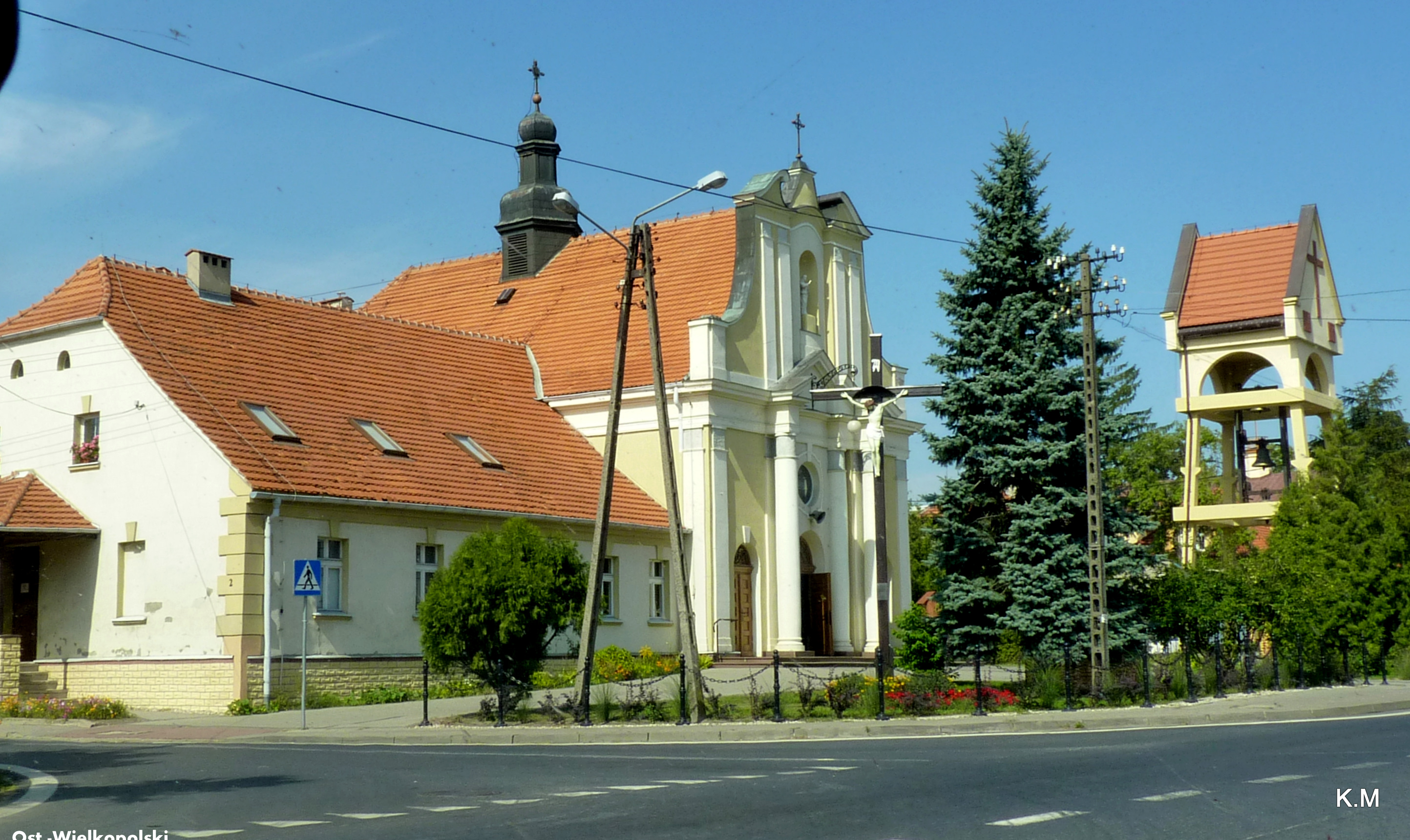 Ostrów Wielkopolski - Kościół Najświętszej Marii Panny Nieustającej Pomocy wraz z dzwonnicą